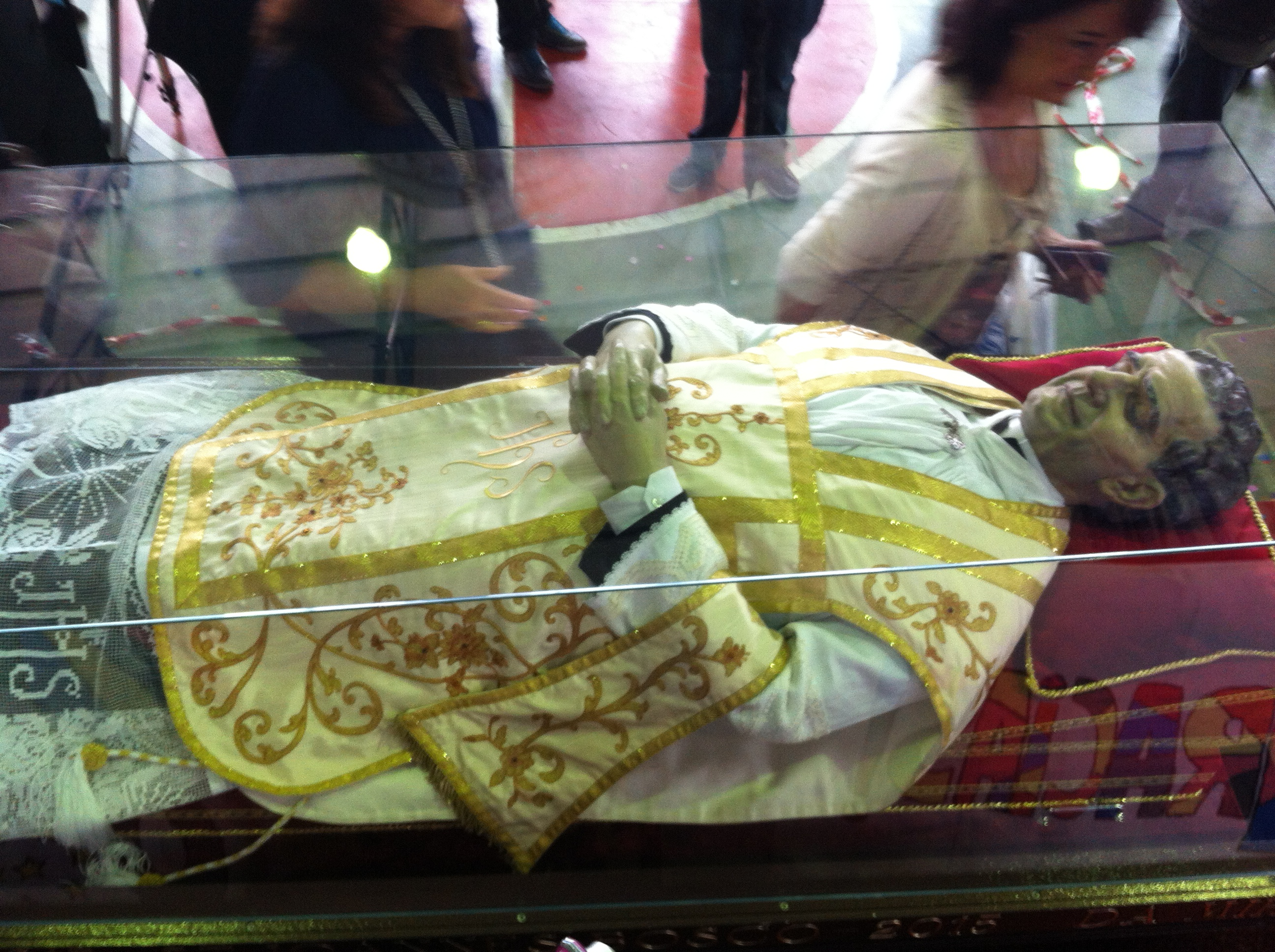 Urna con una reliquia de San Juan Bosco que se encuentra viajando por el mundo con motivo del bicenenario de su nacimiento.